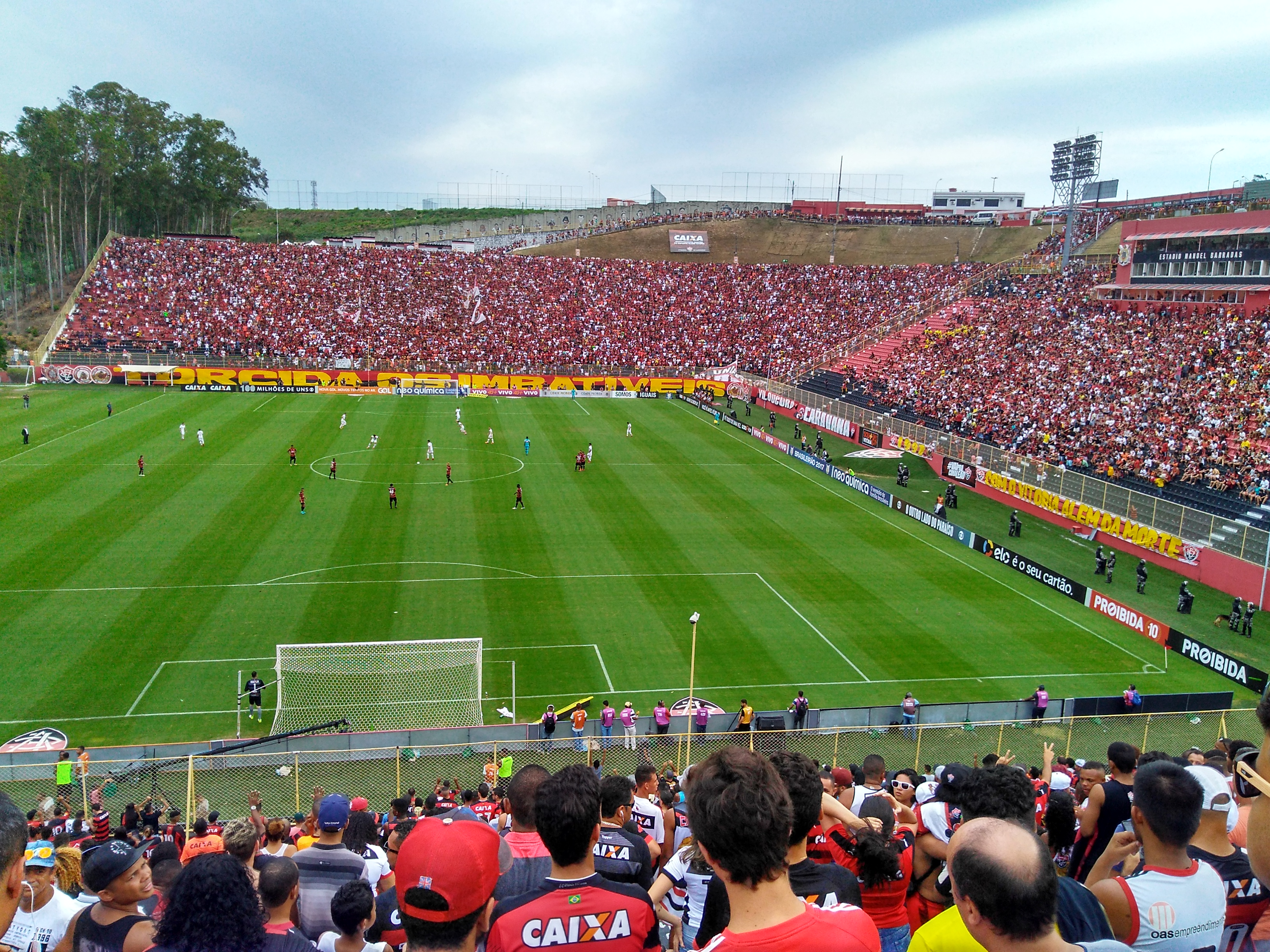 Estádio Barradão, pertence ao Esporte Clube Vitória. Capacidade: 30 mil torcedores.